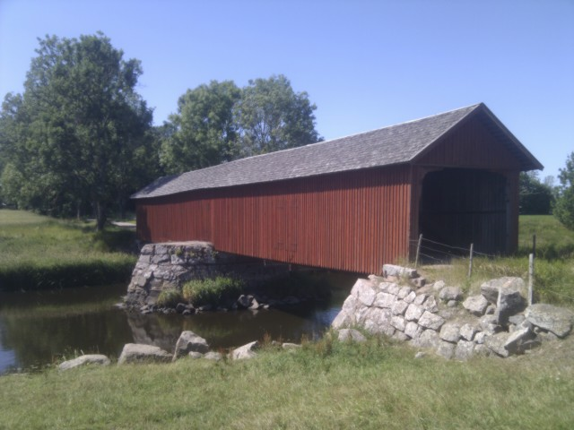 Vaholms bro (RAÄ-nummer Vad 28:1) över ån Tidan vid Vaholms egendom, Vads socken, Skövde kommun, Vadsbo härad, f.d. Skaraborgs län, Västergötland, Västra Götalands län, Sverige.